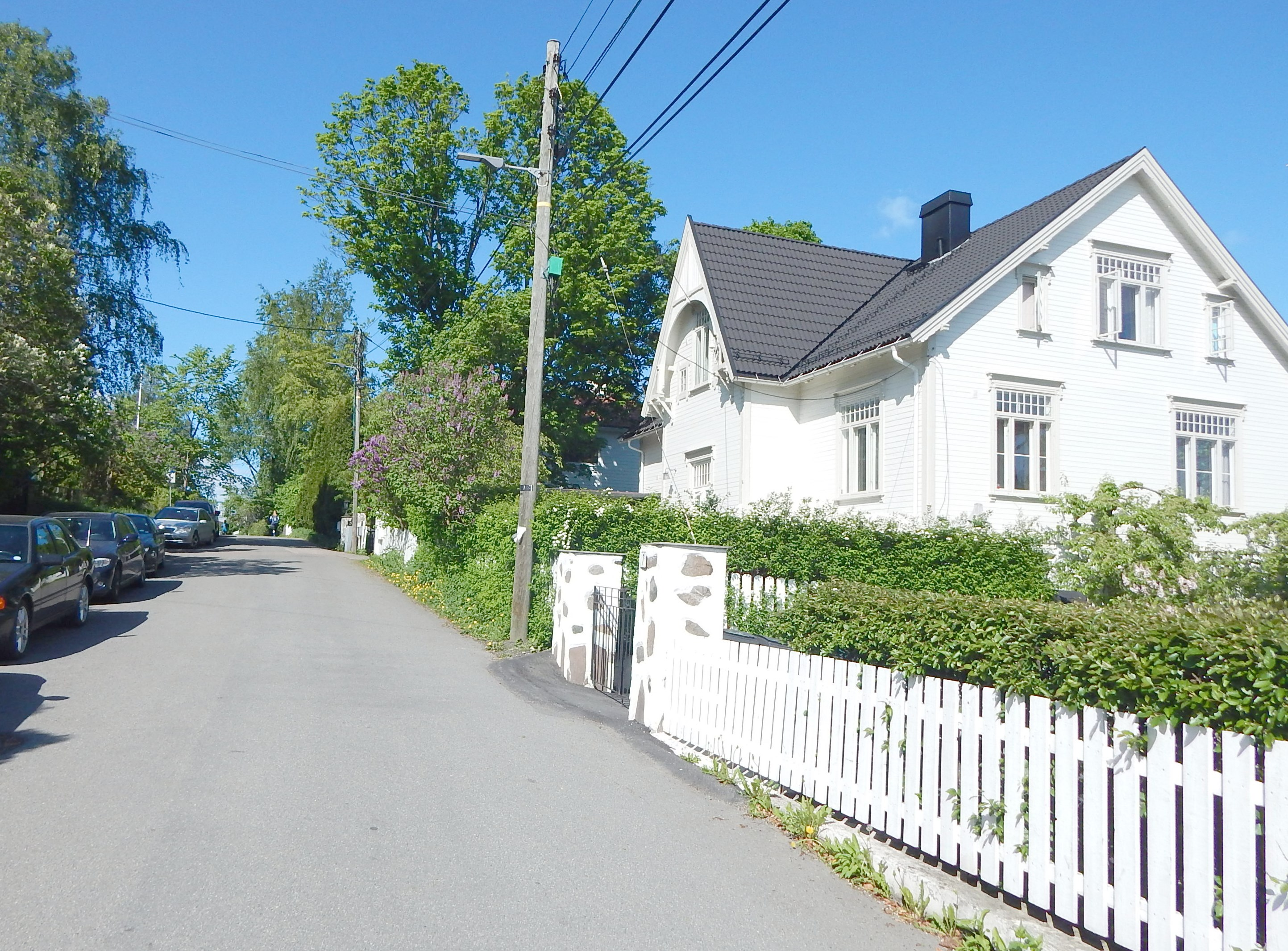 Thaulows vei